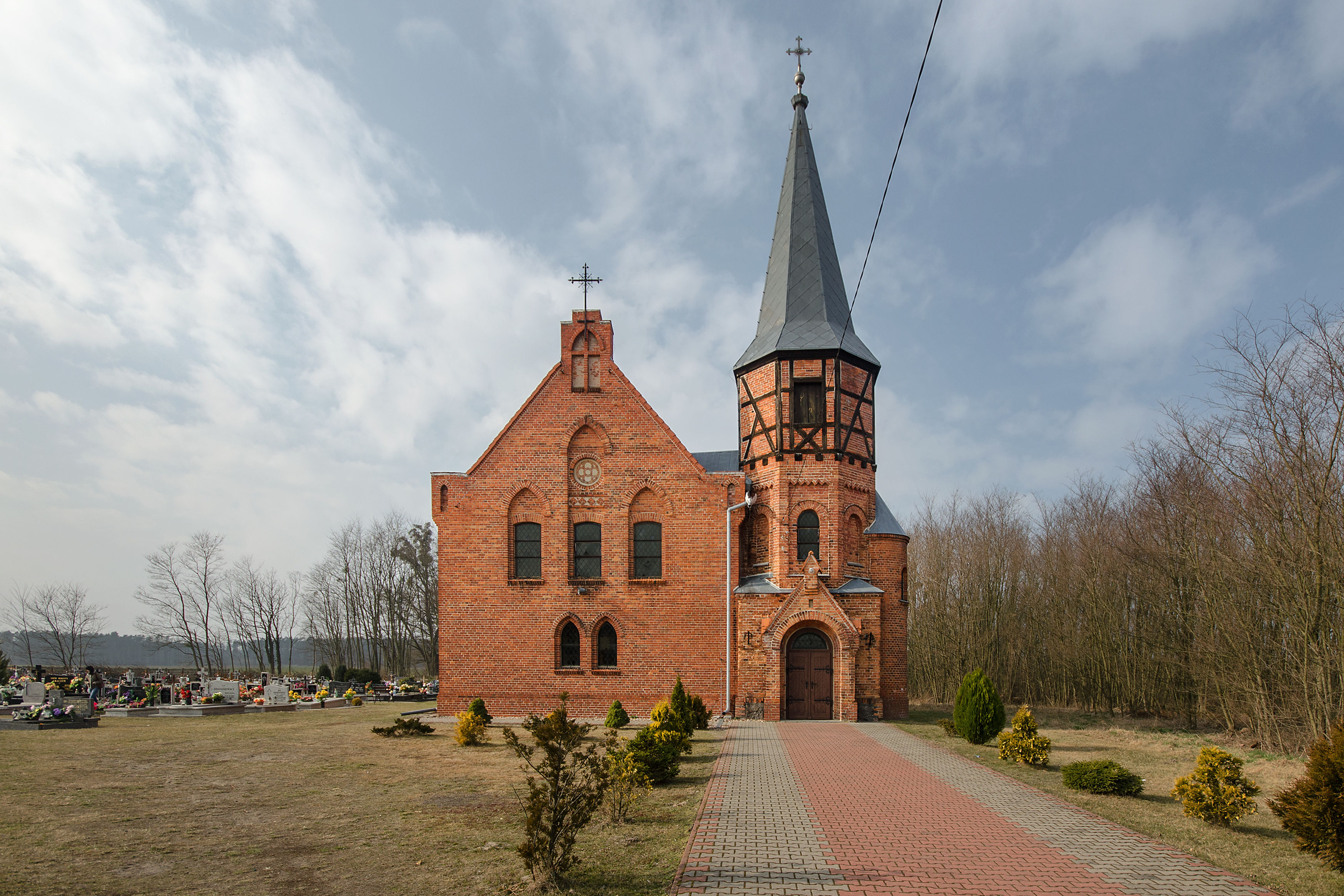 Szczodrów, kościół ewangelicki, ob. rzym.-kat. kaplica cmentarna, 1898-1899